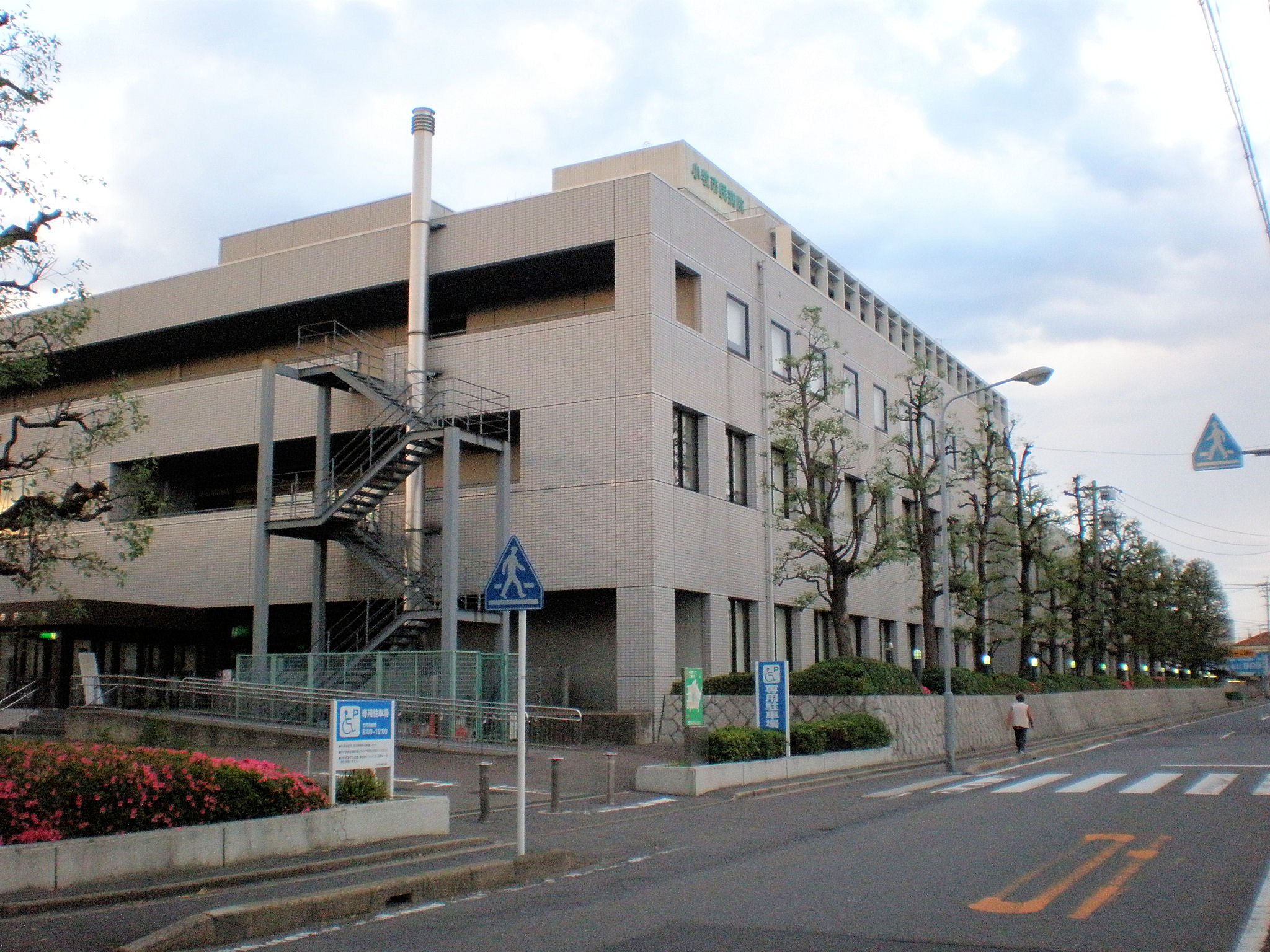 愛知県小牧市にある小牧市民病院